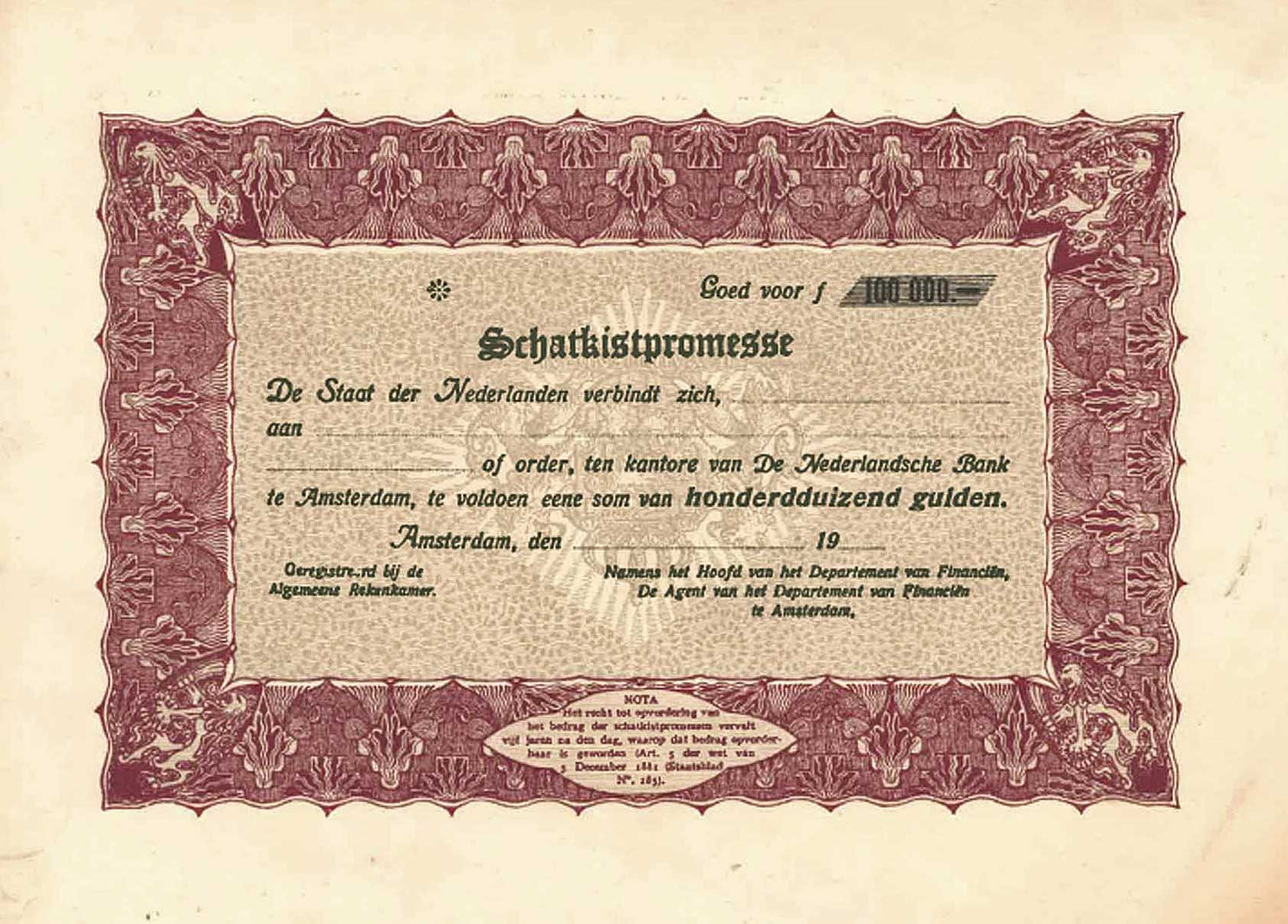 Vervalste schatkistpromesse door het Nationaal Steunfonds. Collectie NIOD